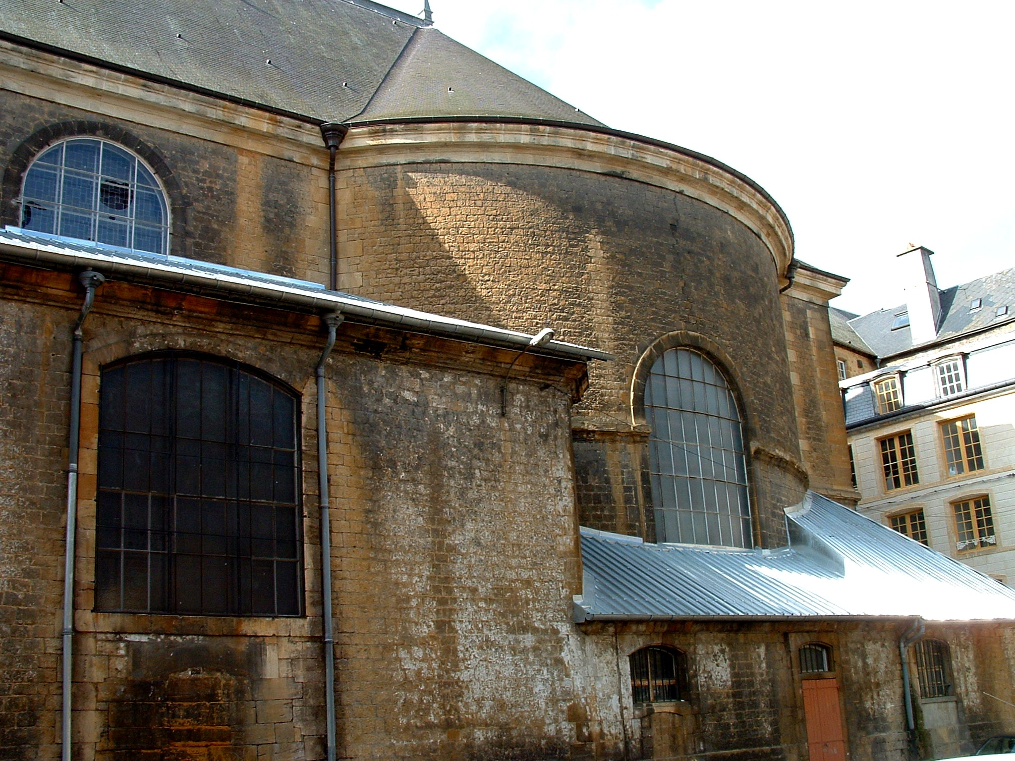 Sedan - Eglise Saint-Charles-Borromée - Abside ajoutée en 1688